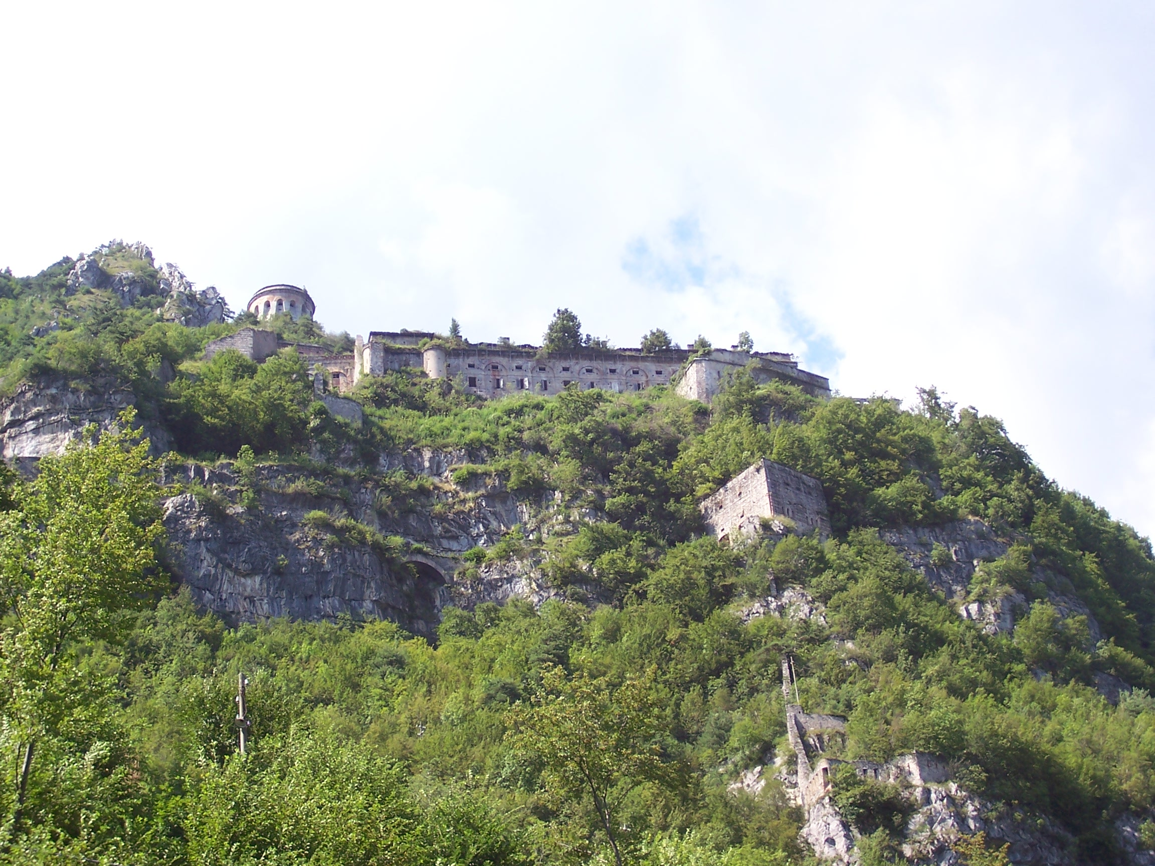 Cadria fotografia Rocca d'Anfo pubblico dominio